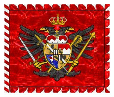 Regimentsflagge